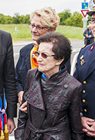 Inauguration de la place Valérie andre a bretigny-sur-orge par le médecin general Valérie andre